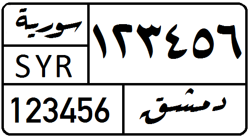 نمونه پلاک سوریه